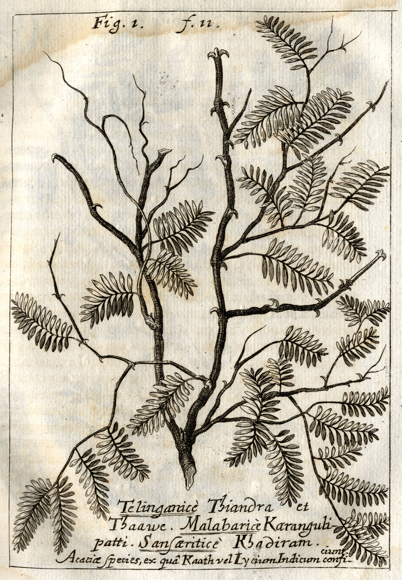 Abbildung eines Akazienzweiges aus Herbert de Jagers Abhandlung "De Sementina".